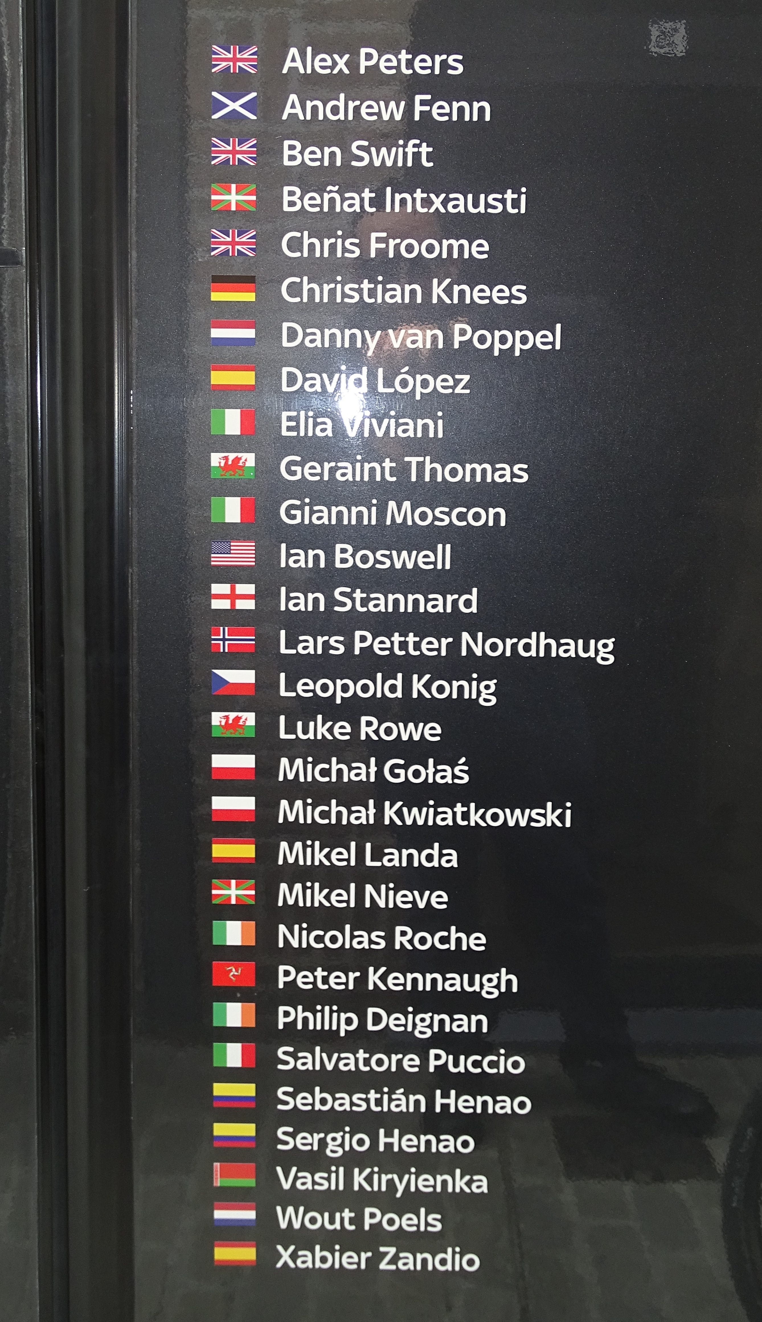 Reportage réalisé le mercredi 16 mars à l'occasion du départ de la Nokere Koerse 2016 à Deinze, Belgique.